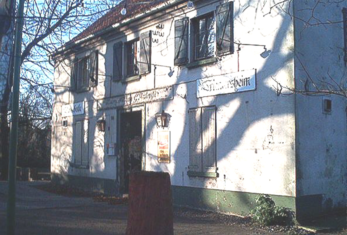 Die Dorfschenke in Duisburg-Friemersheim